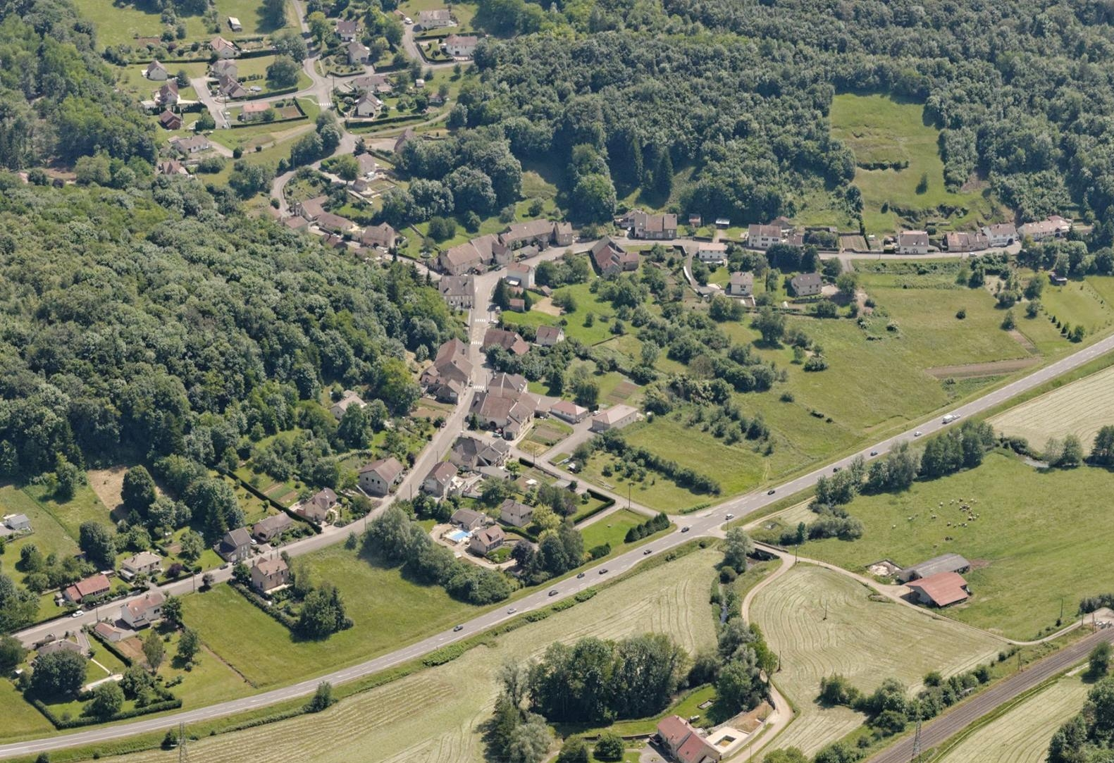 Comberjon (Haute-Saône)